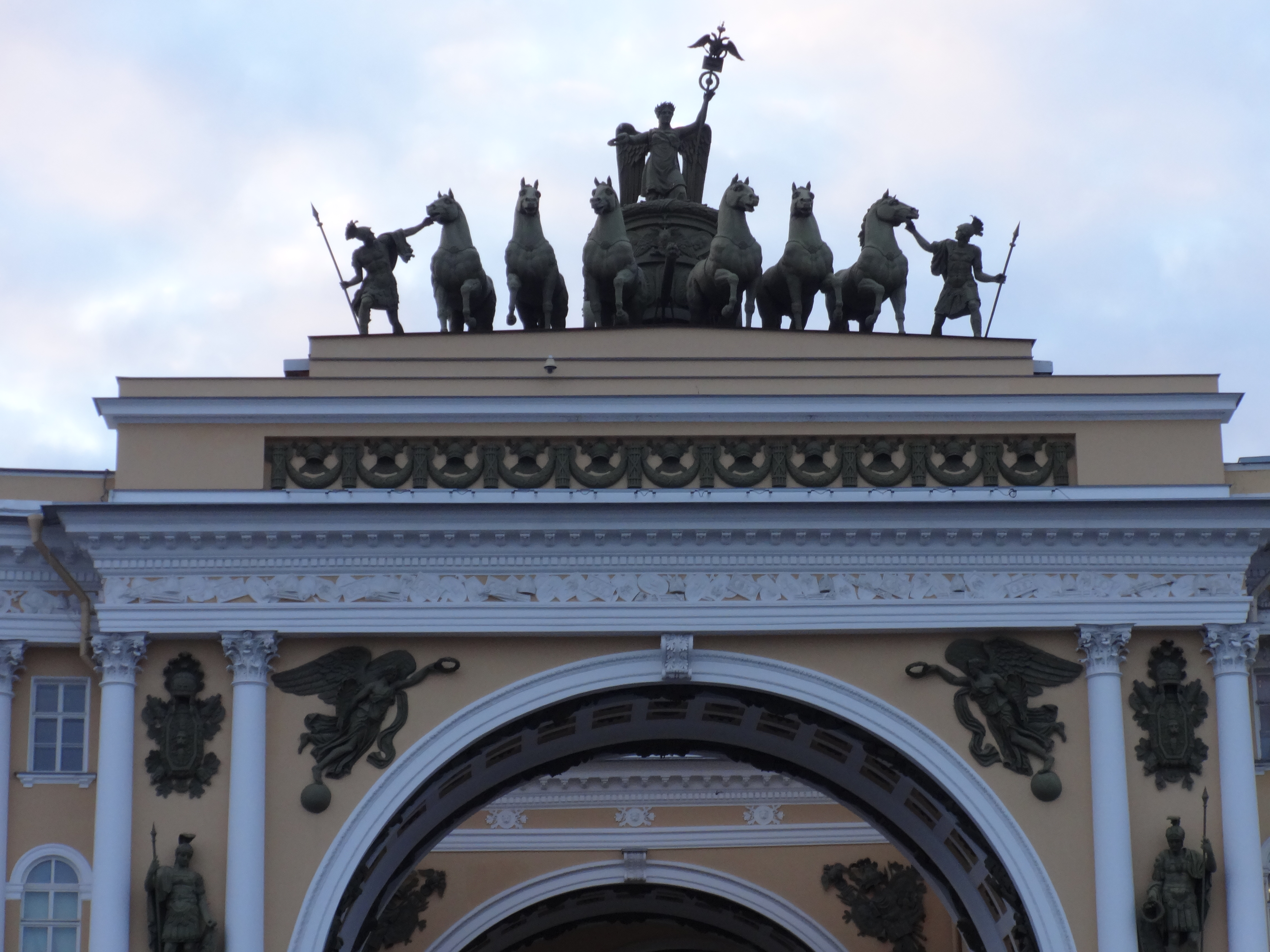 Главный штаб и Министерства (Санкт-Петербург и Лен.область, Санкт-Петербург, Дворцовая площадь, 6, 8, 10, Невский проспект, 2, Большая Морская улица, 1, 2, р. Мойки наб., 39-47)